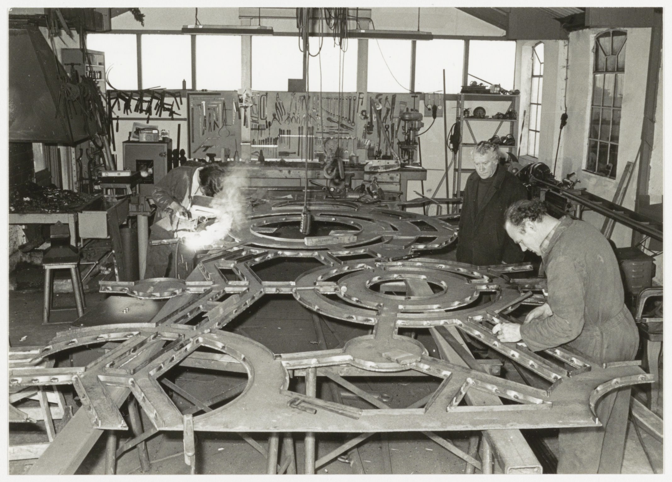 CollectieCollectie Fotoburo de BoerInventarisnummerNL-HlmNHA_54006018NL-HlmNHA_1478_9312KBeschrijvingSmederij Schouten aan de Zuid Schalkwijkerweg 21 waar kunstenaar Jules Chapon onderdelen van zijn werk laat smeden.FotonummerNL-HlmNHA_1478_5095DocumenttypeTopografische prenten, tekeningen en foto'sVervaardigerBoer, Poppe de Soort vervaardigerFotograaf Interieur/ExterieurInterieurPersonenChapon, JulesSchouten, C.J. LandNederland ProvincieNoord-Holland GemeenteHaarlem PlaatsHaarlem StraatZuid Schalkwijkerweg GeografischSchalkwijk Begindatum18-03-1971Einddatum18-03-1971TechniekFoto TrefwoordenBeeldende Kunsten, Smederijen